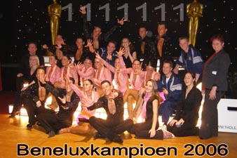 Description Double V Benelux Kampioen Date2 April 2006Source Hoorenman / Tim van LeeuwenPermission (Reusing this file) Toestemming van auteur Double V Benelux Kampioen